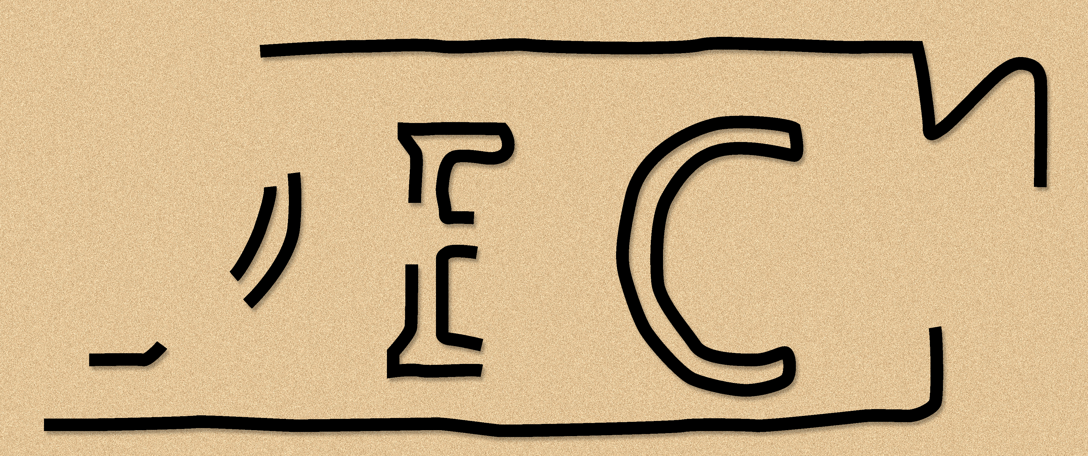 Sotin (Cornacum), Kroatien: Ziegelstempel DEC(urionum). Nachweis: Mato Ilkić: Pečati na antičkim opekama i krovnim crepovima iz Sotina (Cornacum). In: Prilozi Inst. Arh. Zagrebu 38/2005 Zagreb 2005. S. 16–52; hier: S. 47.